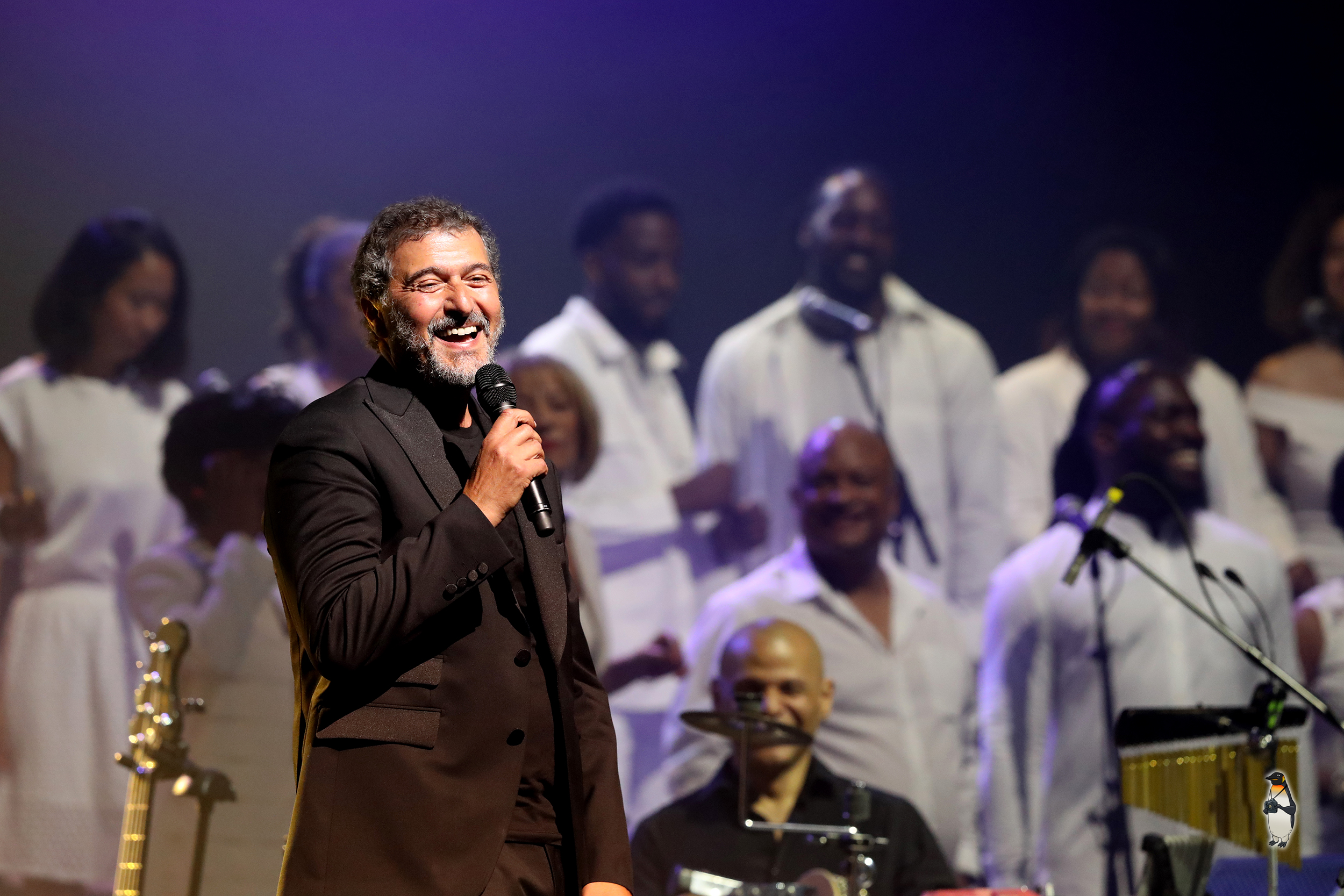 Daniel Levi sur la scène de l'Olympia (6 juin 2019)